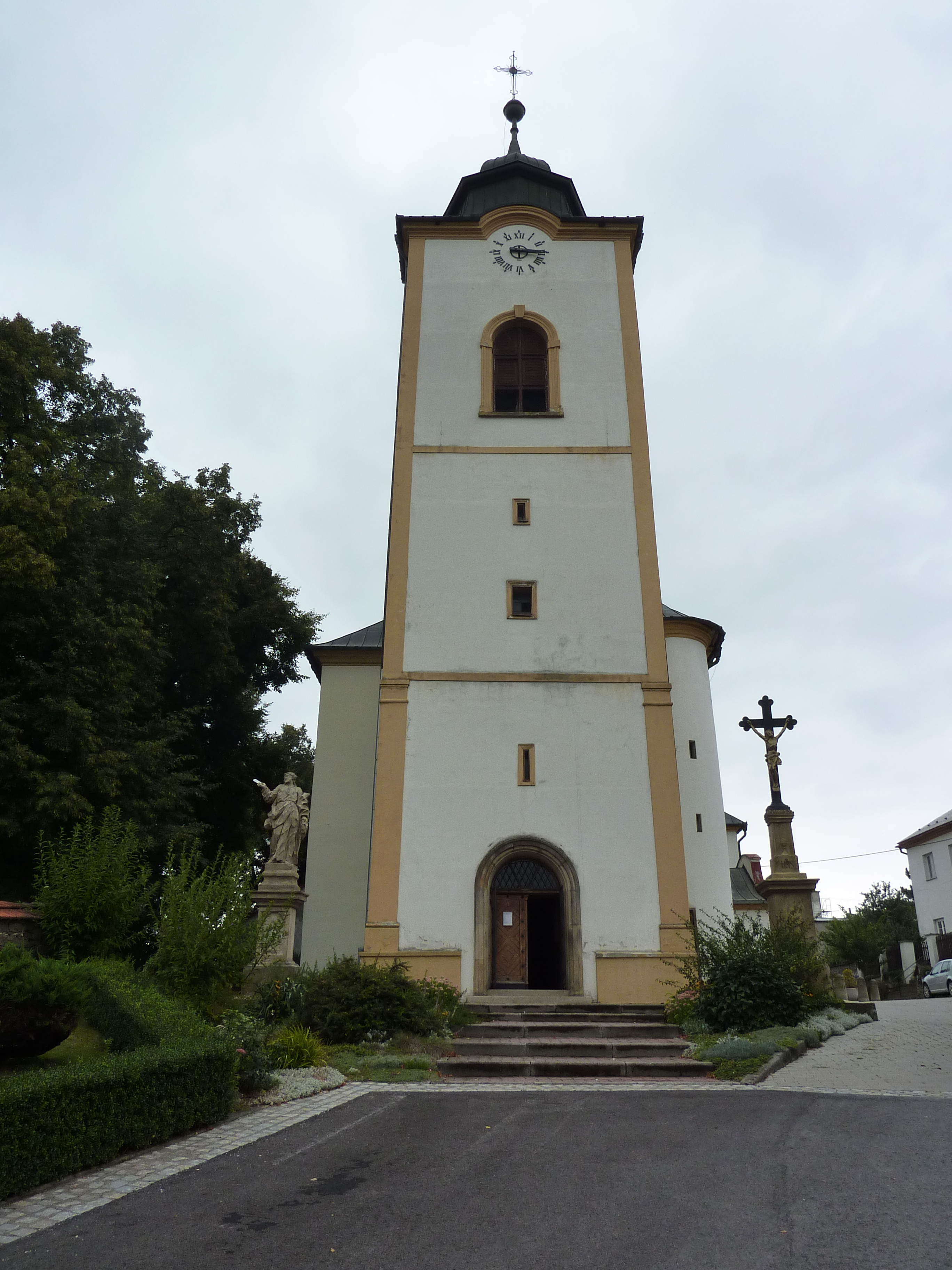 Kostel Stětí sv. Jana Křtitele (Velká Bystřice)